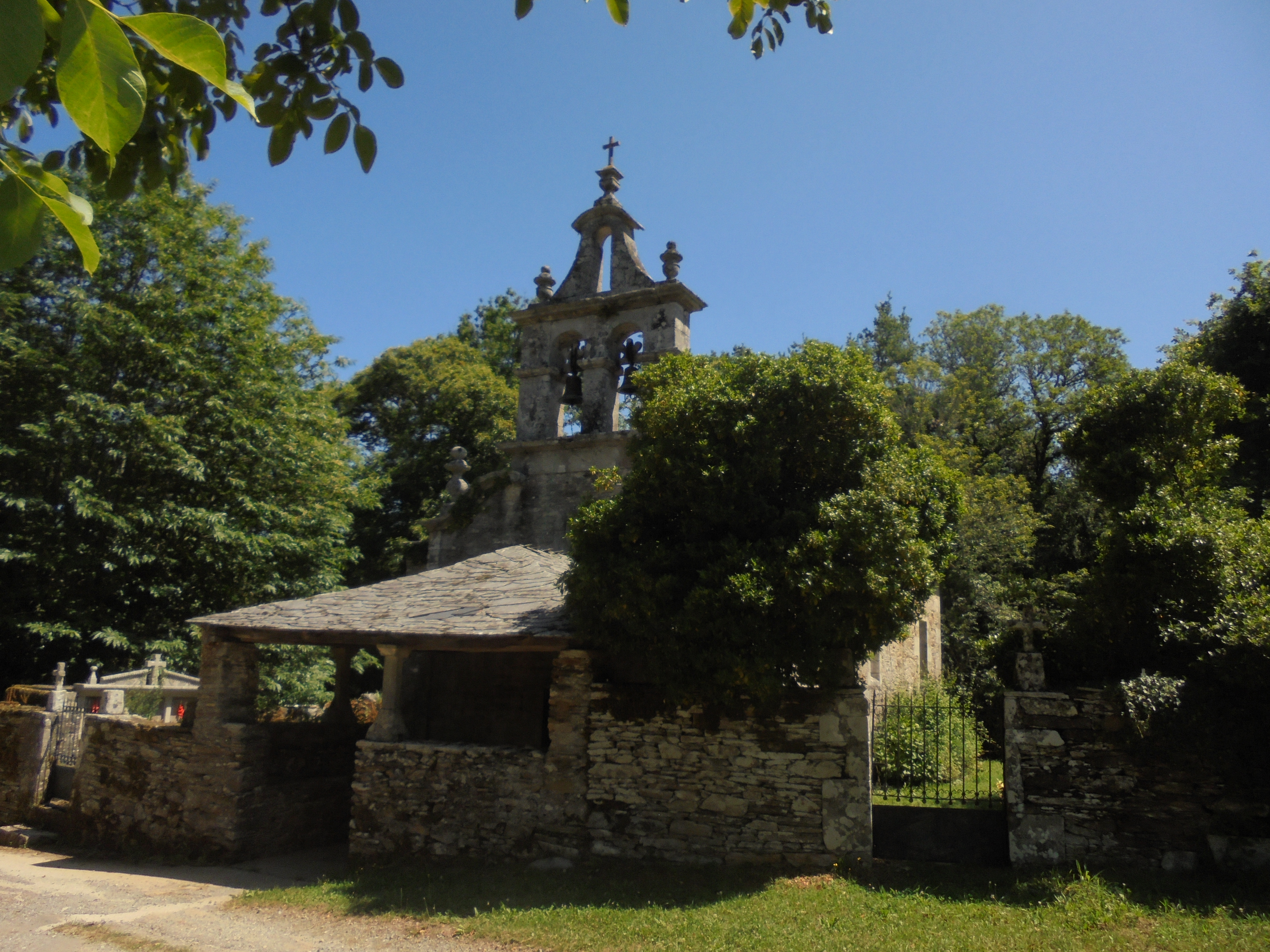 Igrexa de Santo Tomé de Guimarei